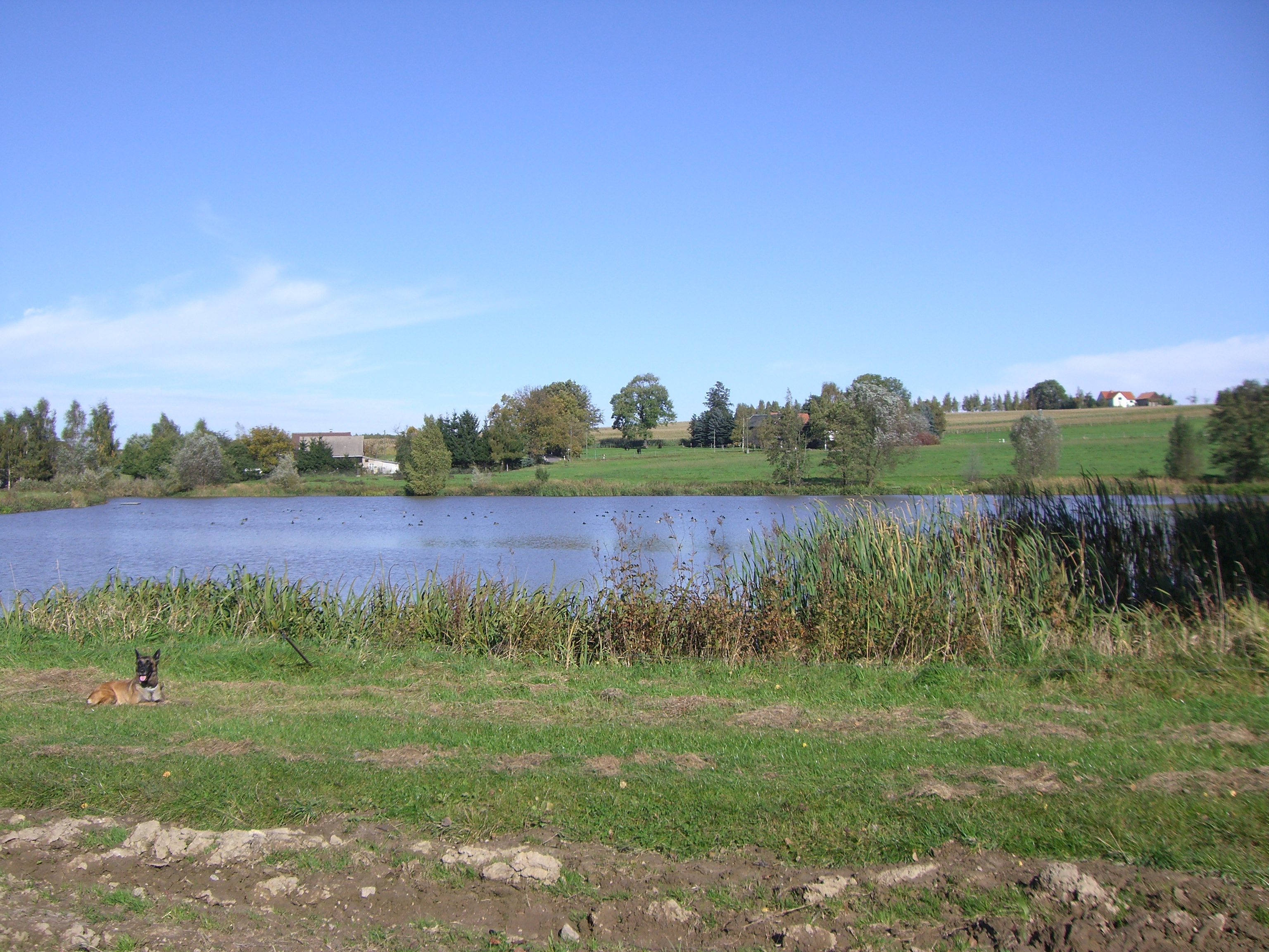 Erlicht, Lösch- und Angelteich